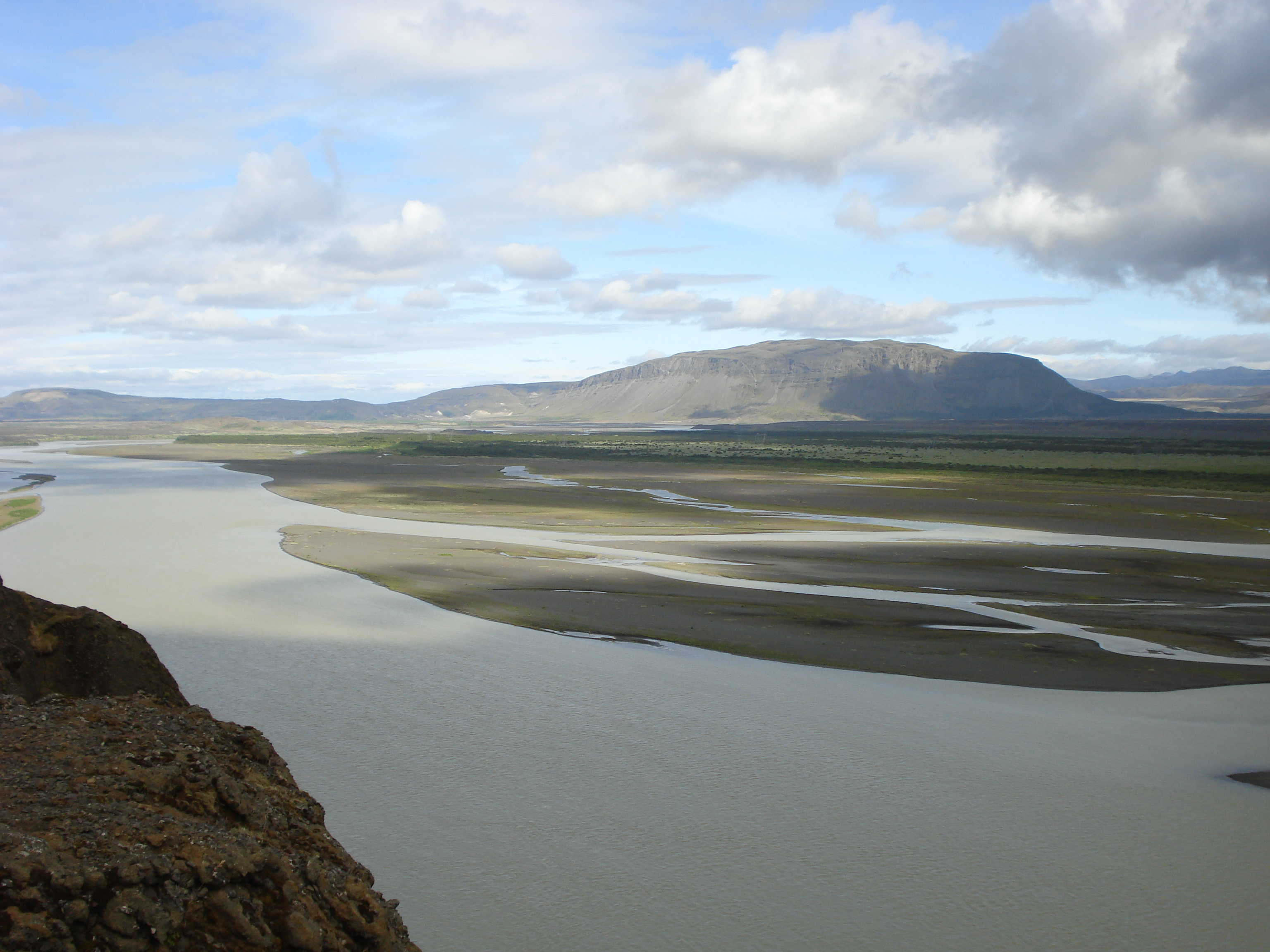 Þjórsá in Þjórsárdalur, Iceland